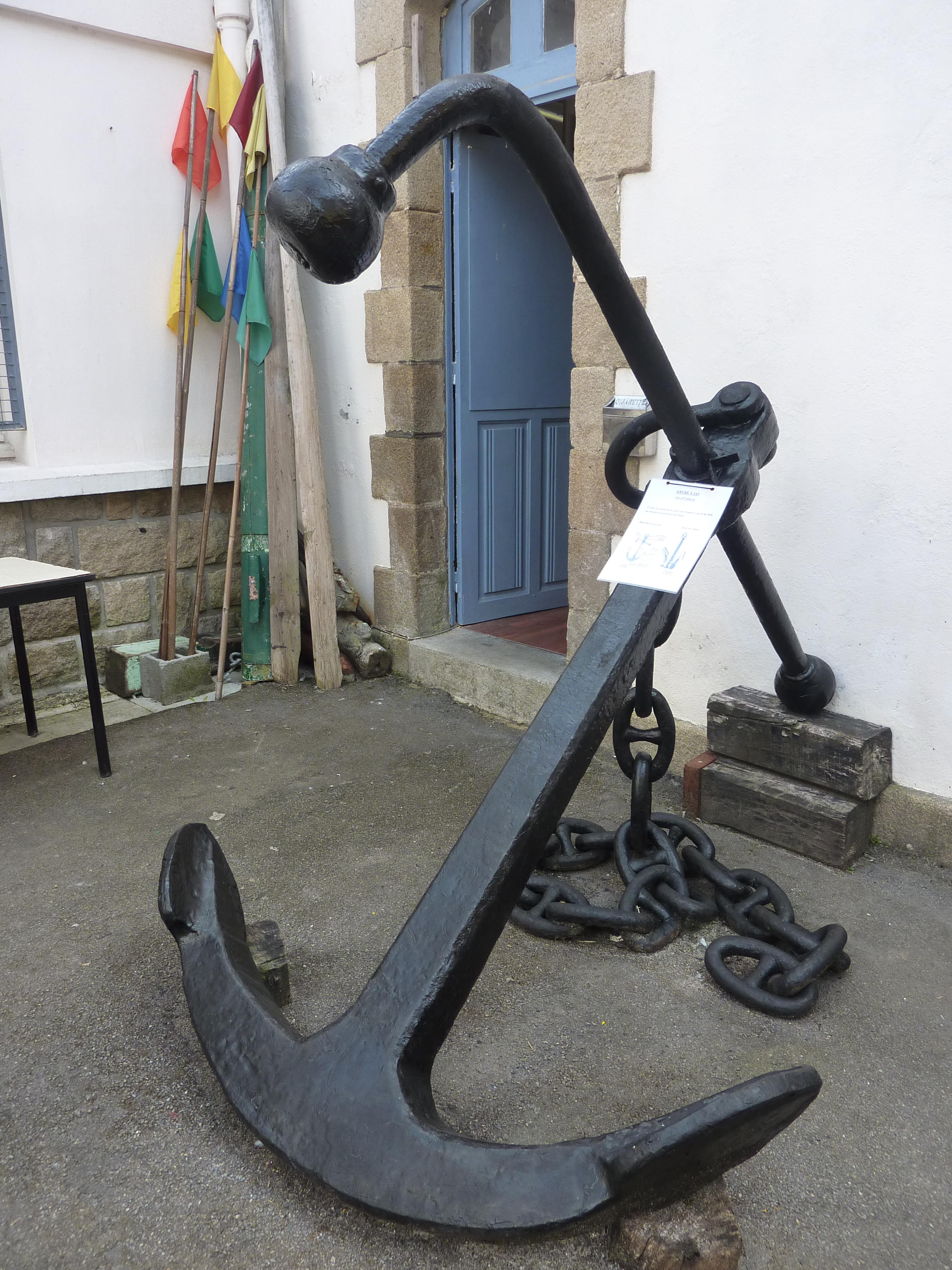 Musée d'Audierne : ancre à jas du milieu du XIXème siècle (ce type d'ancre marine a été remplacé à partir de 1870 par des ancres basculantes type Marel).